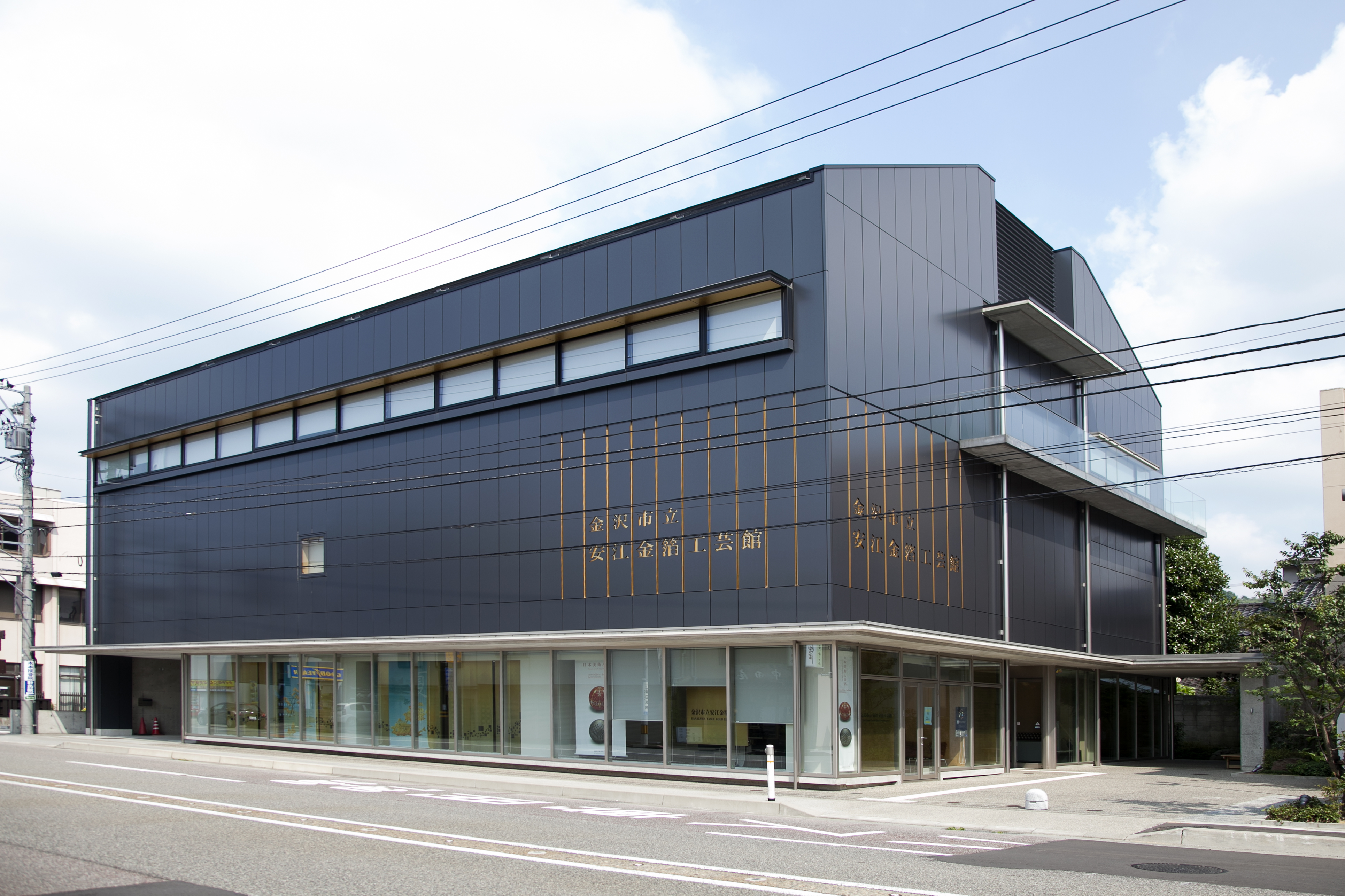 安江金箔工芸館